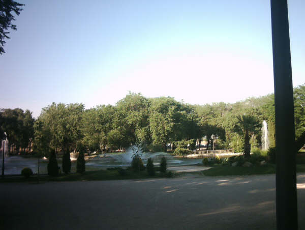 Parque de la Dehesa de Boyal, popularmente conocido como ´´Parque de los Pinos``